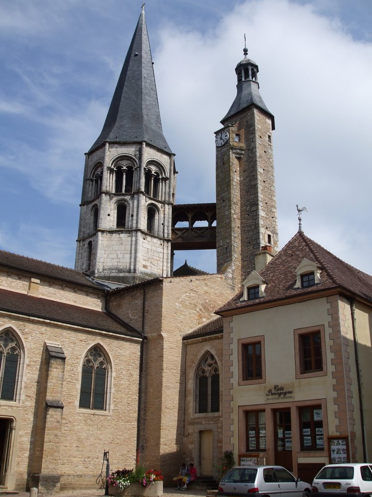 Eglise de Saint-Gengoux-le-National